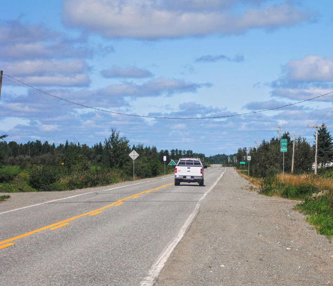 Vue sur la route 399, à Trécesson, en Abitibi.